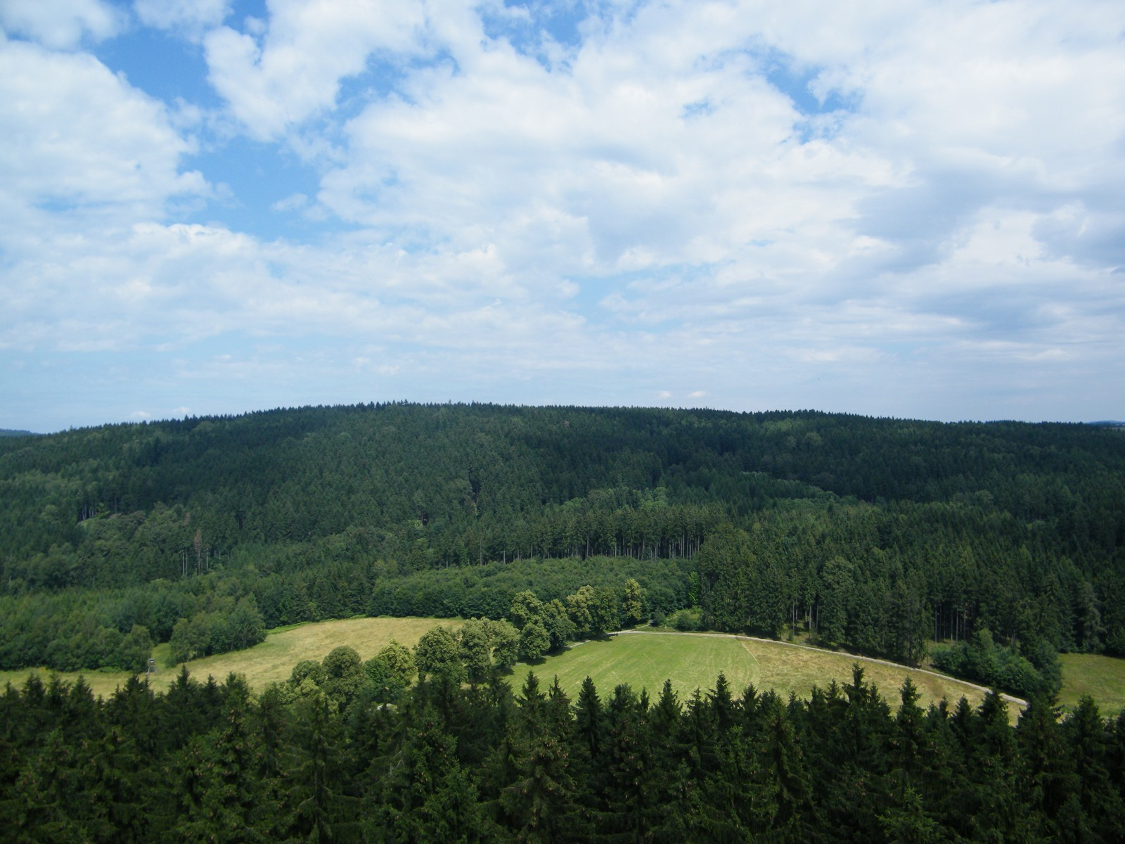 Hančův vrch u Mikulášovic, pohled z Weifbergu